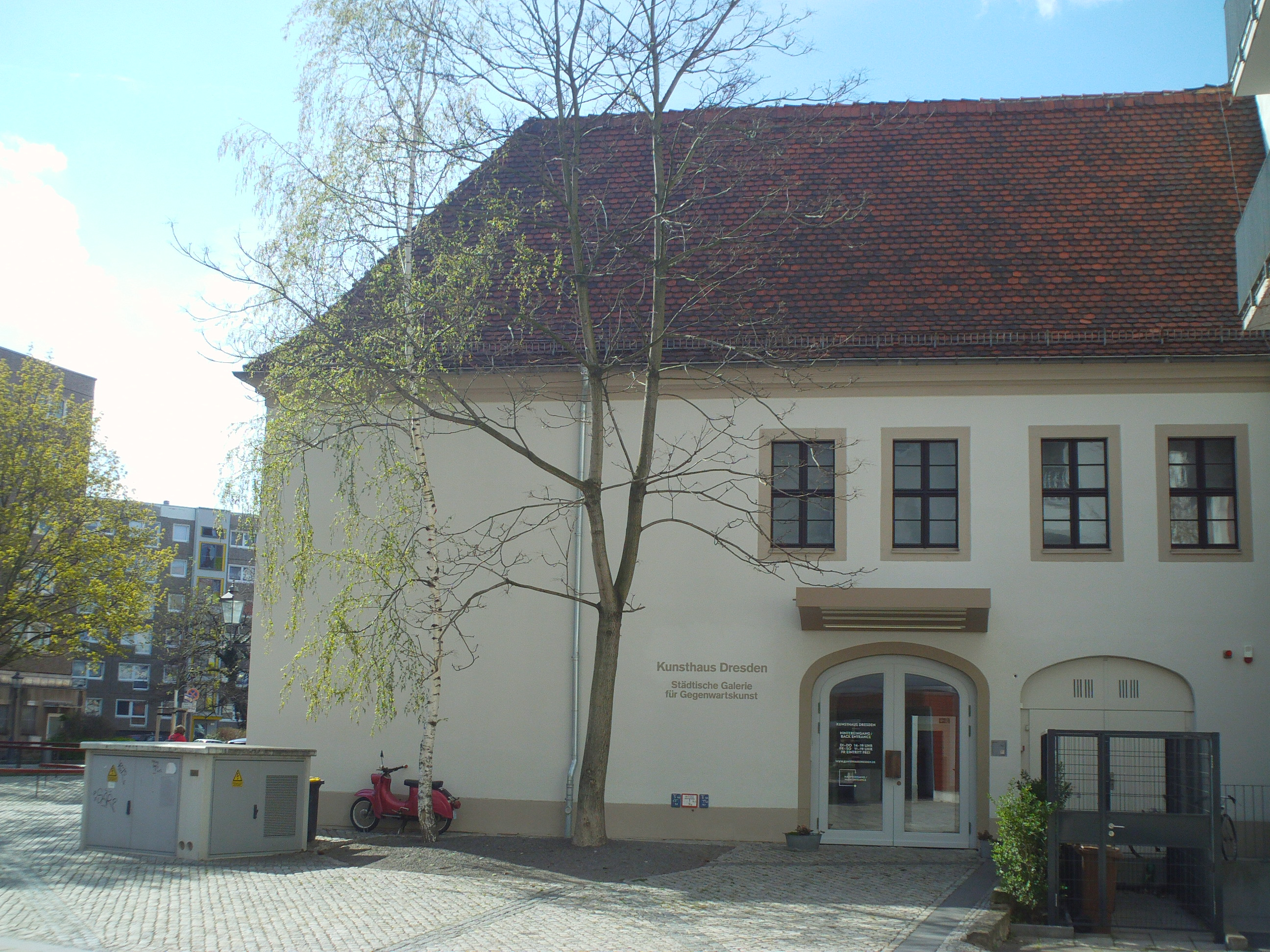 Deitsch: Kunsthaus Dresden Hintereingang